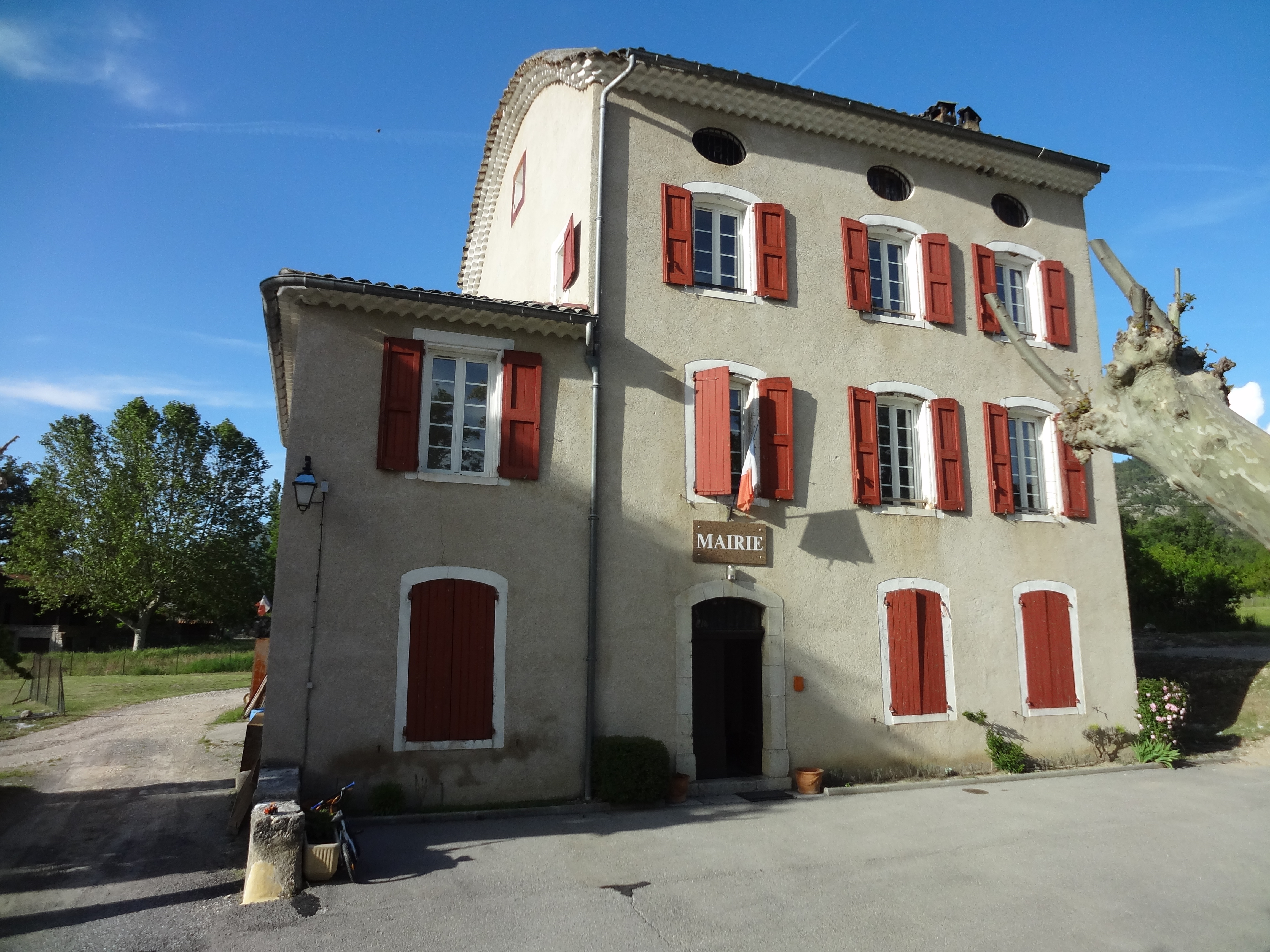 La mairie sert aussi de logement